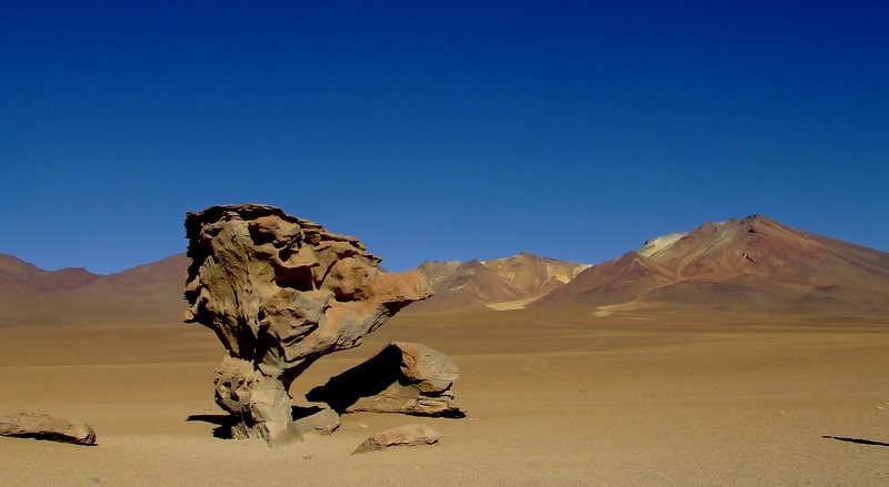 El Árbol de Piedra en Altiplano andino. Runa Simi: Sach'a Rumi.